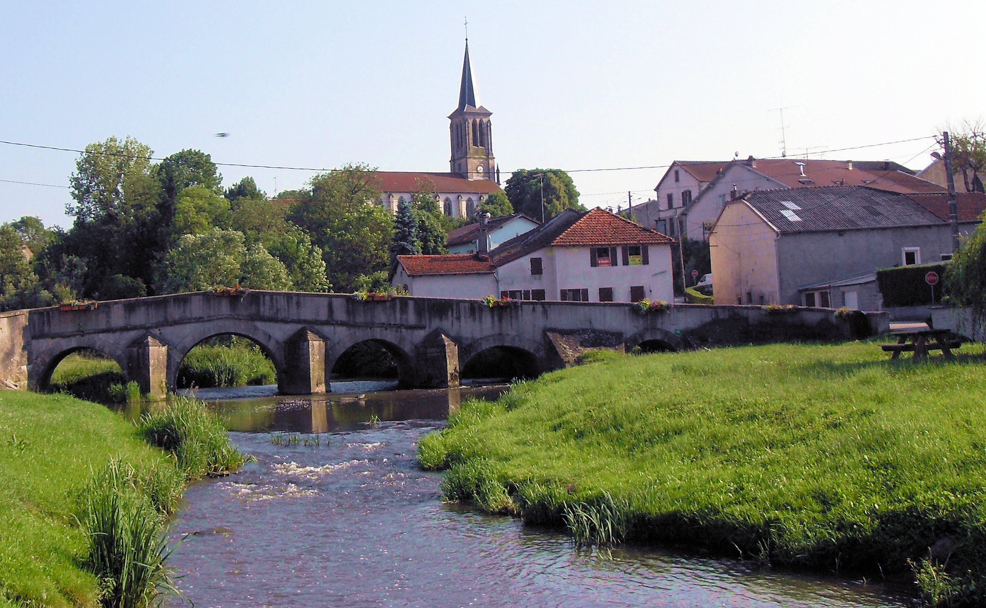 Vue sur le Durbion Durbion à Vaxoncourt avec l'église de Saint-Martin